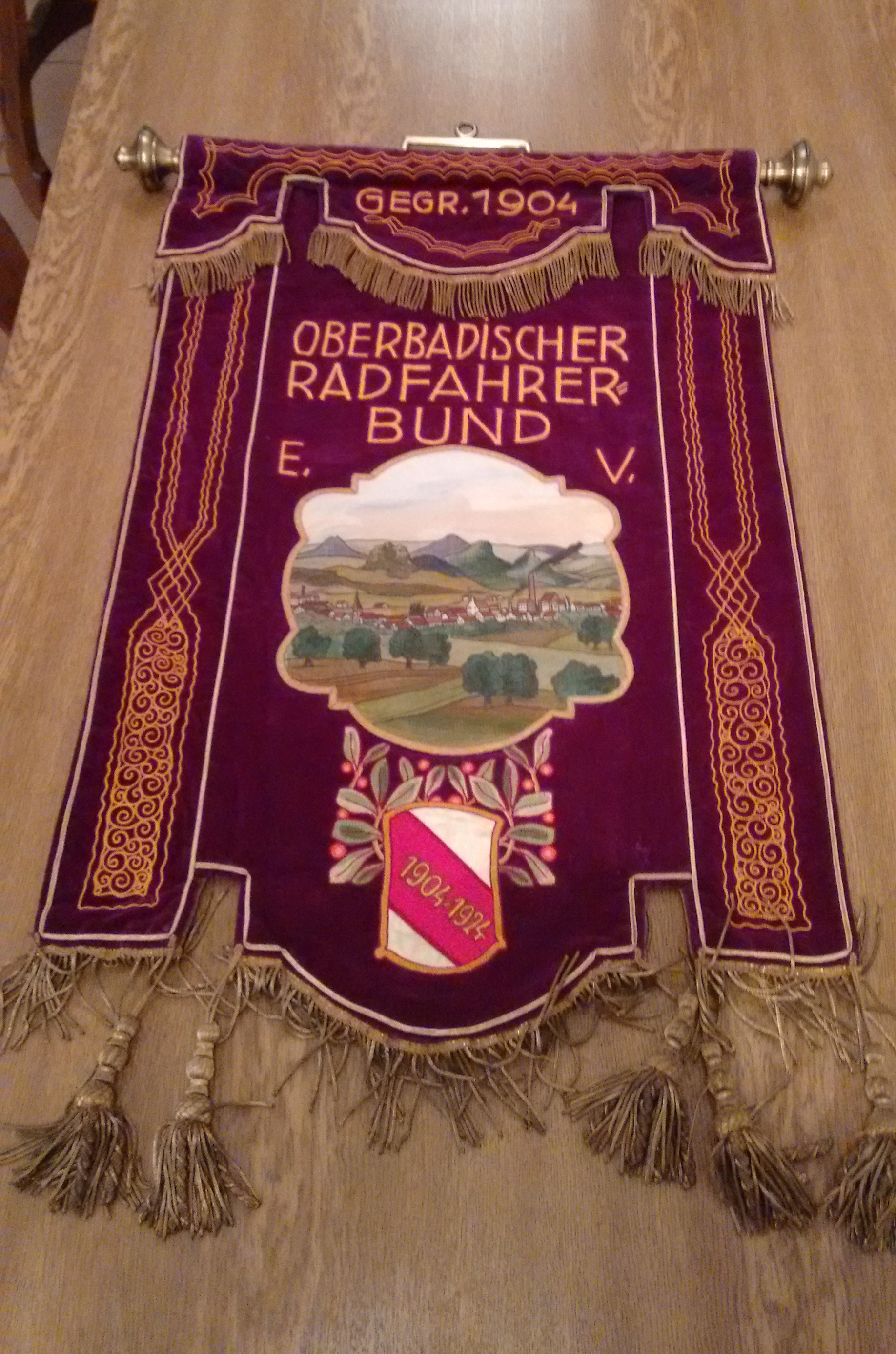 Ein Banner, der anlässlich des 20. Jubiläums des "Oberbadischen Radfahrer Bundes" (OBRB) allen Mitgliedsvereinen überreicht wurde, die bereits seit der Verbandsgründung 1904 dem OBRB angehörten. Das Bild zeigt die Vorderseite des Banners.